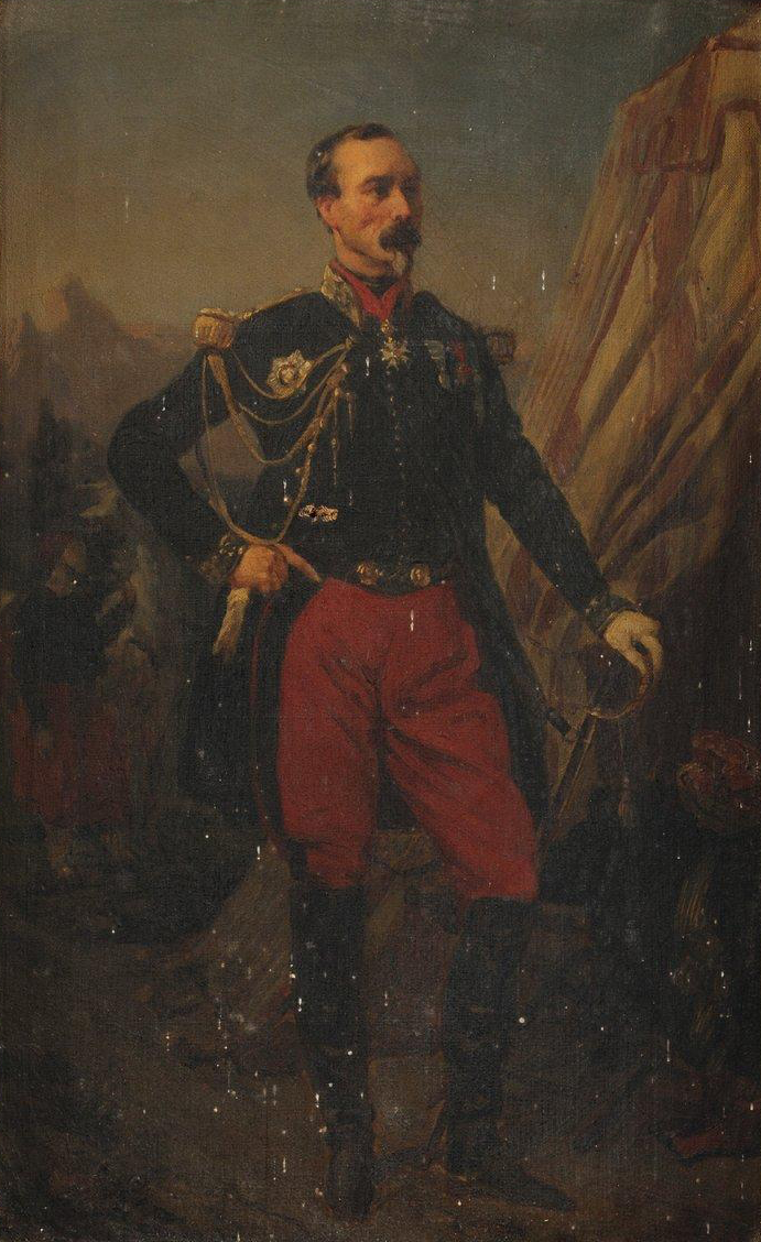 Charles-Marie-Esprit Espinasse (1815-1859)